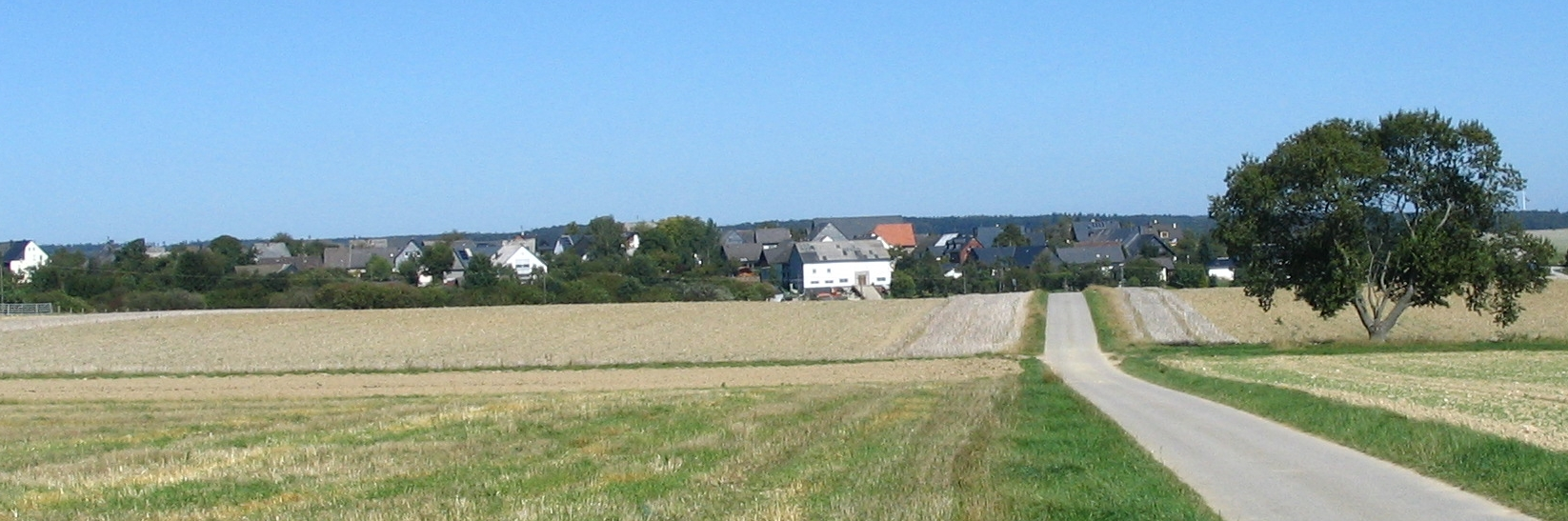 Michelbach/Hunsrück von Süden